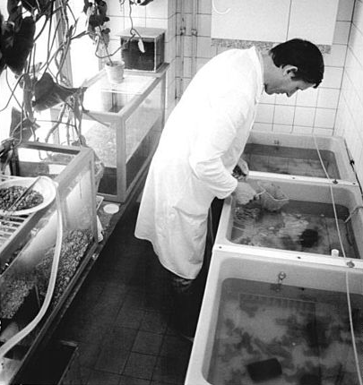 cutted version of Bundesarchiv Bild 183-1986-0731-022, Leipzig, Universität, Warmwasserfrösche.jpg